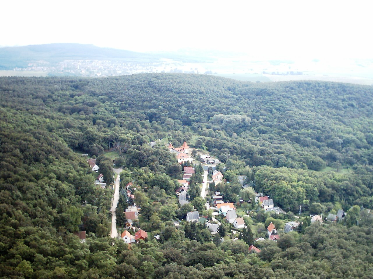 Klastrompuszta